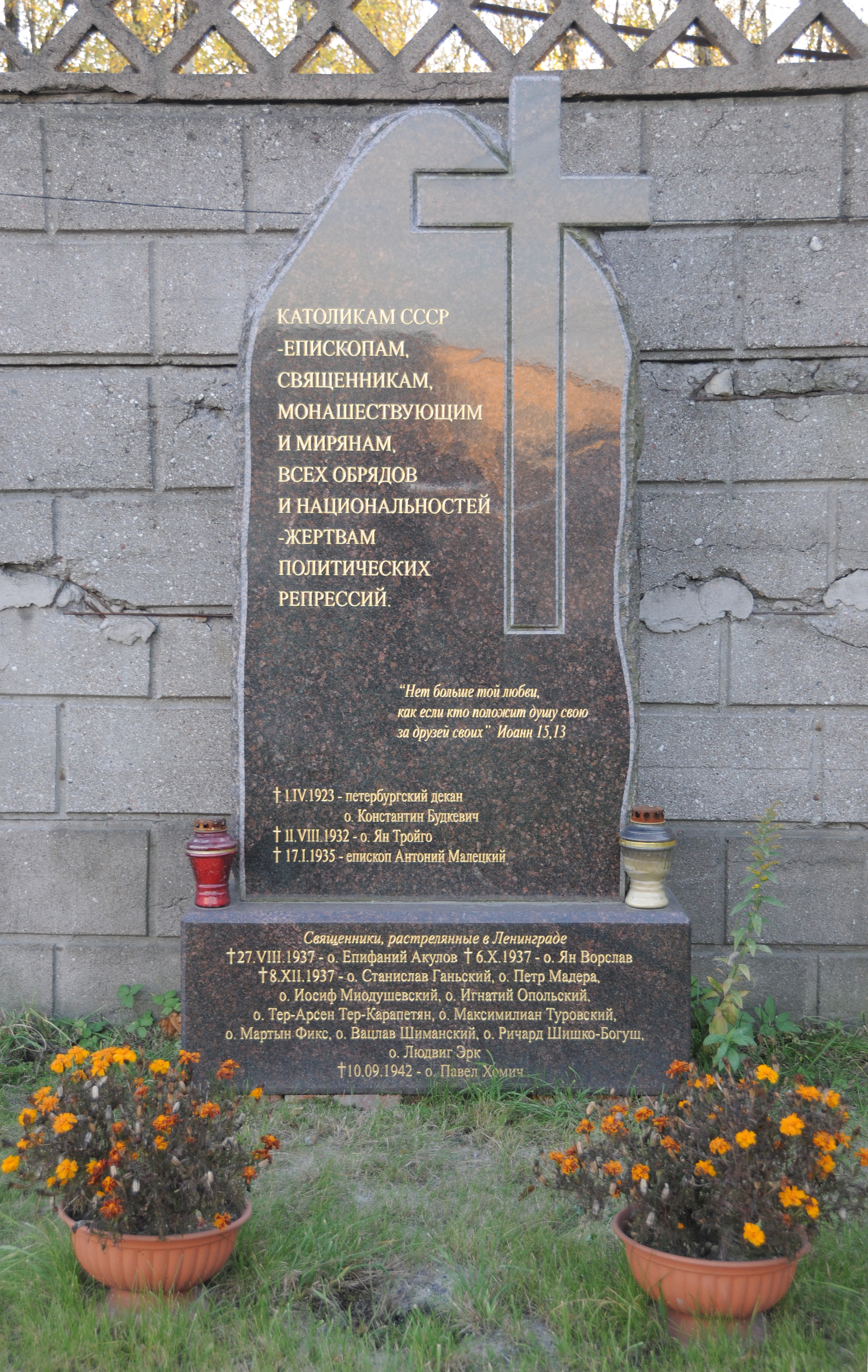 Памятник католикам СССР - жертвам репрессий на территории бывшего римско-католического кладбища в Петербурге. Фото 2014 года.